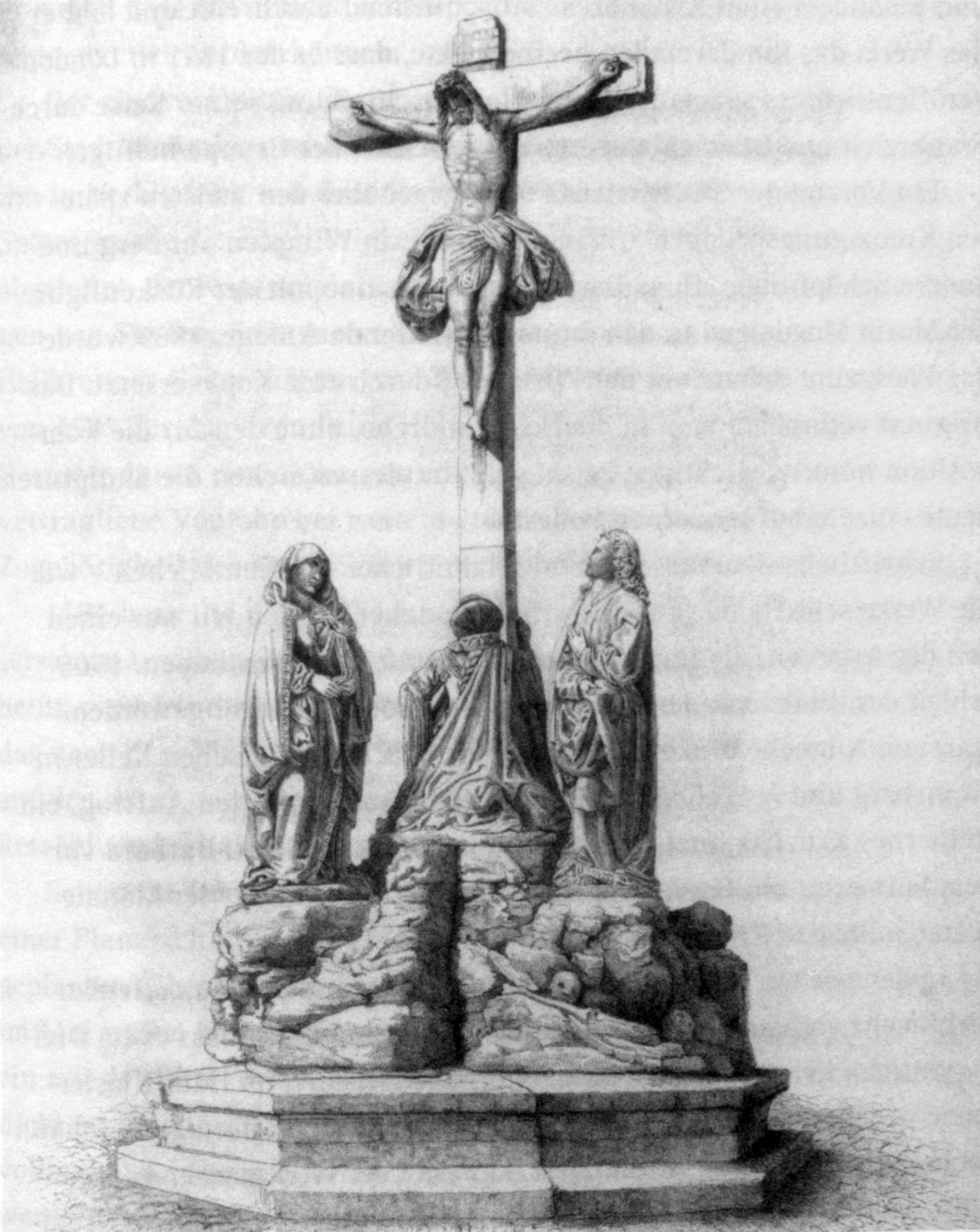 Kreuzigungsgruppe von Hans Seyfer aus dem Jahr 1501, Stich von B. Mitan aus dem Jahr 1821 nach einer Zeichnung von Lewis, 1818. Die Kreuzigungsgruppe stand ursprünglich bei der Leonhardskirche, 1905 wurden die Figuren und das Kruzifix (ohne den Felshügel) in die Hospitalkirche versetzt. Die heute bei der Leonhardskirche stehende Gruppe ist eine Kopie des Originals.